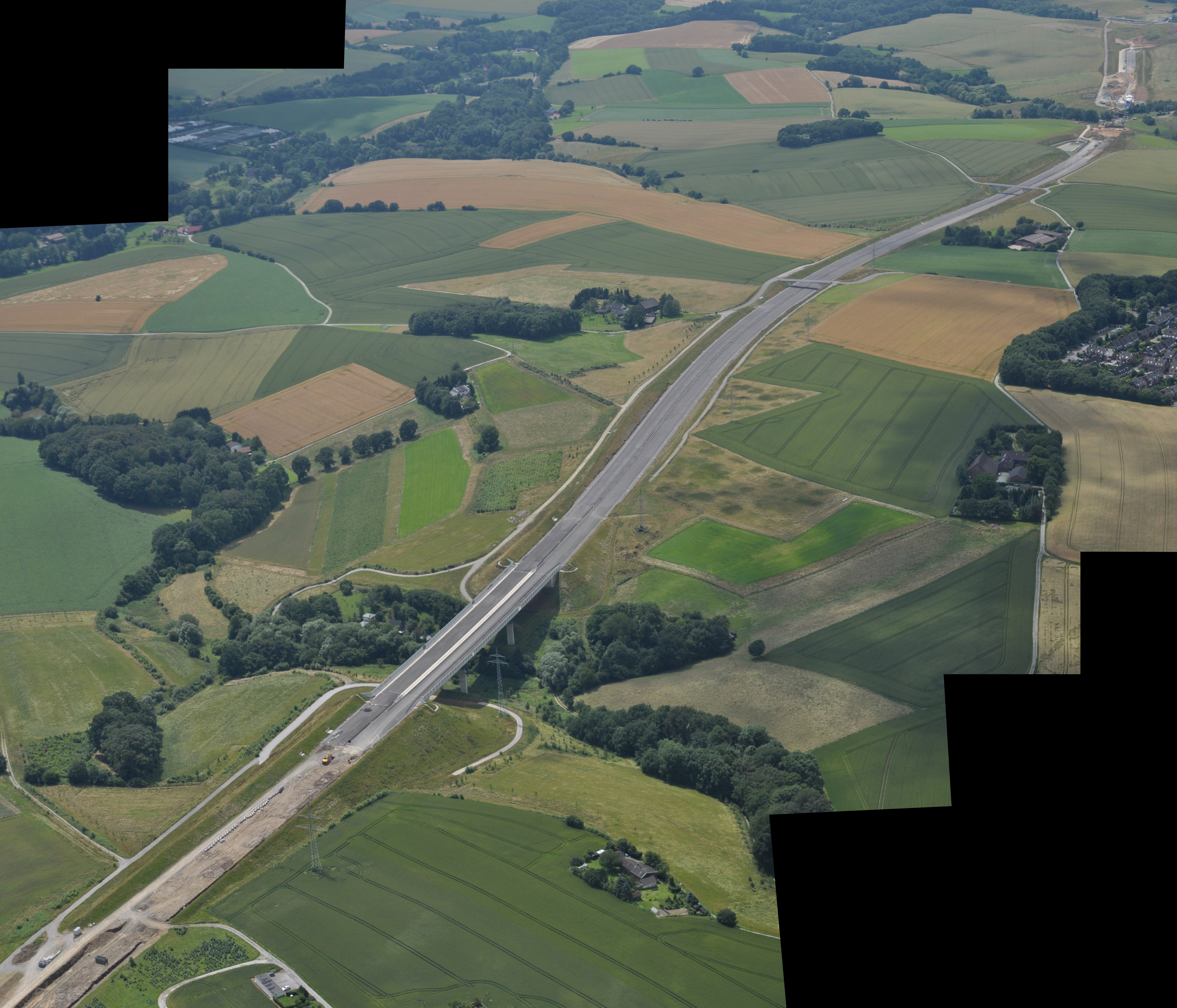 Bauzustand der A44 bei Velbert, 26. Juni 2016. Blick von Nordosten nach Südwesten